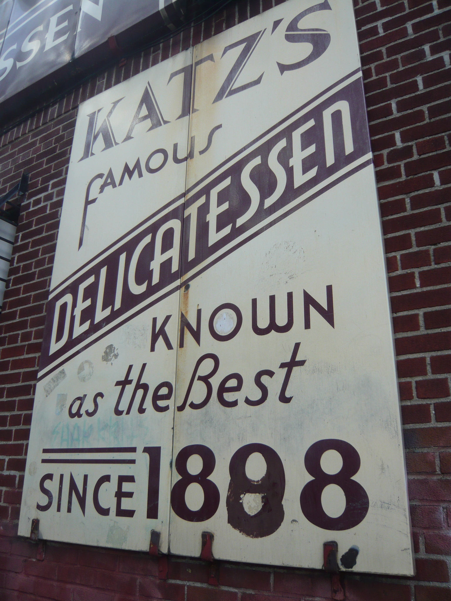 Katz's Delicatessen sign